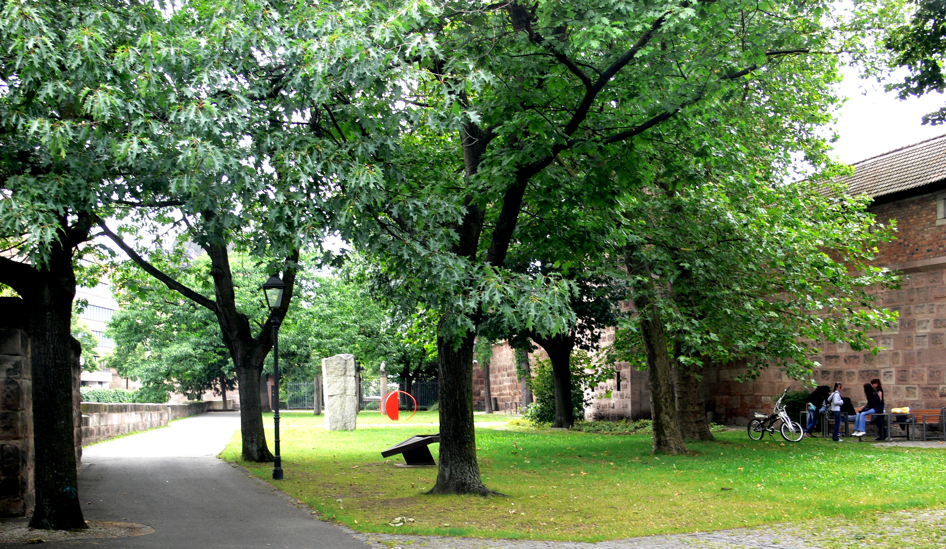 Skulpturengarten Nürnberg (Zwinger der Frauentormauer)